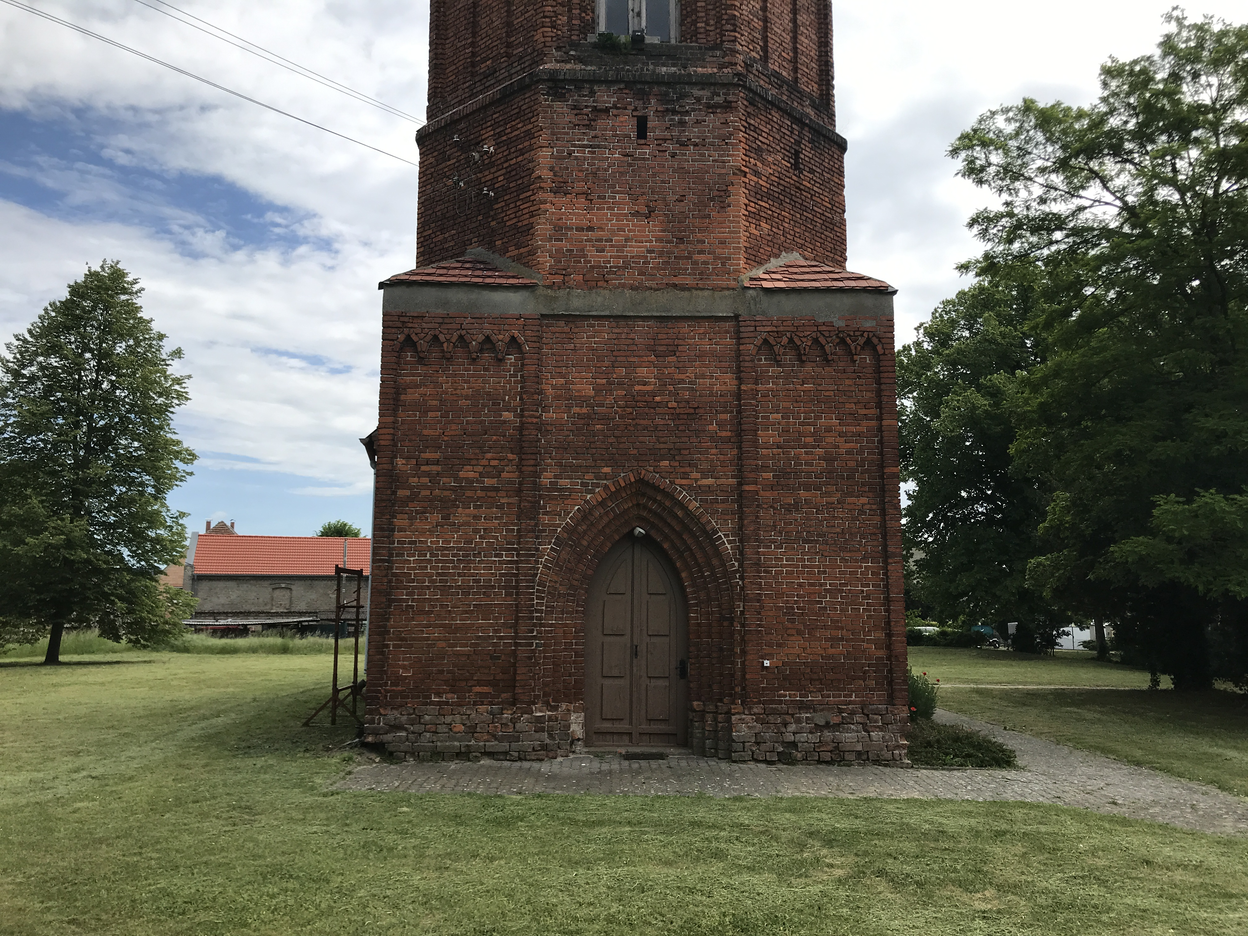 Die Dorfkirche Wachow ist eine im Kern spätgotische Saalkirche in Wachow, einem Ortsteil der Stadt Nauen im Landkreis Havelland in Brandenburg. Im Innern steht unter anderem ein Kanzelaltar aus der Zeit um 1730.